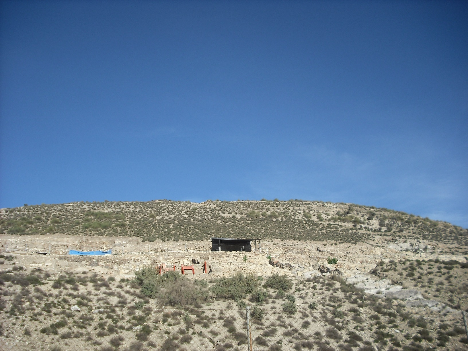 Vista de las Excavaciones del poblado de la Edad del Bronce del Cabezo Redondo, en Villena